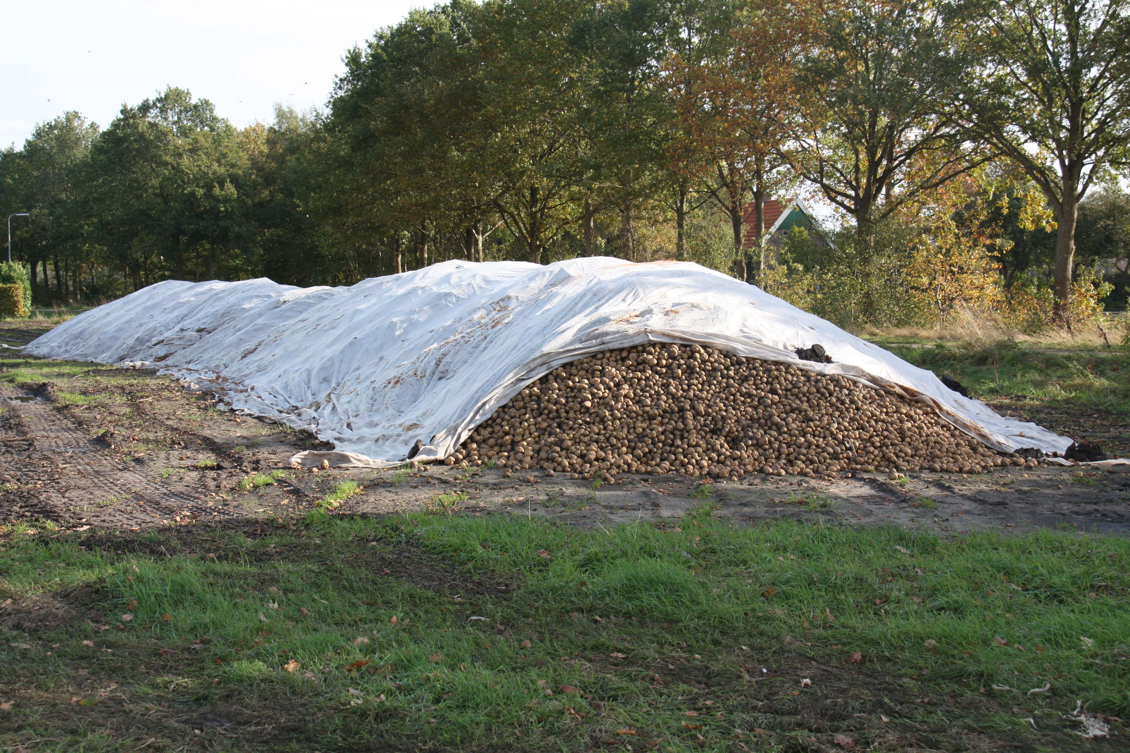 Gerooide aarappels